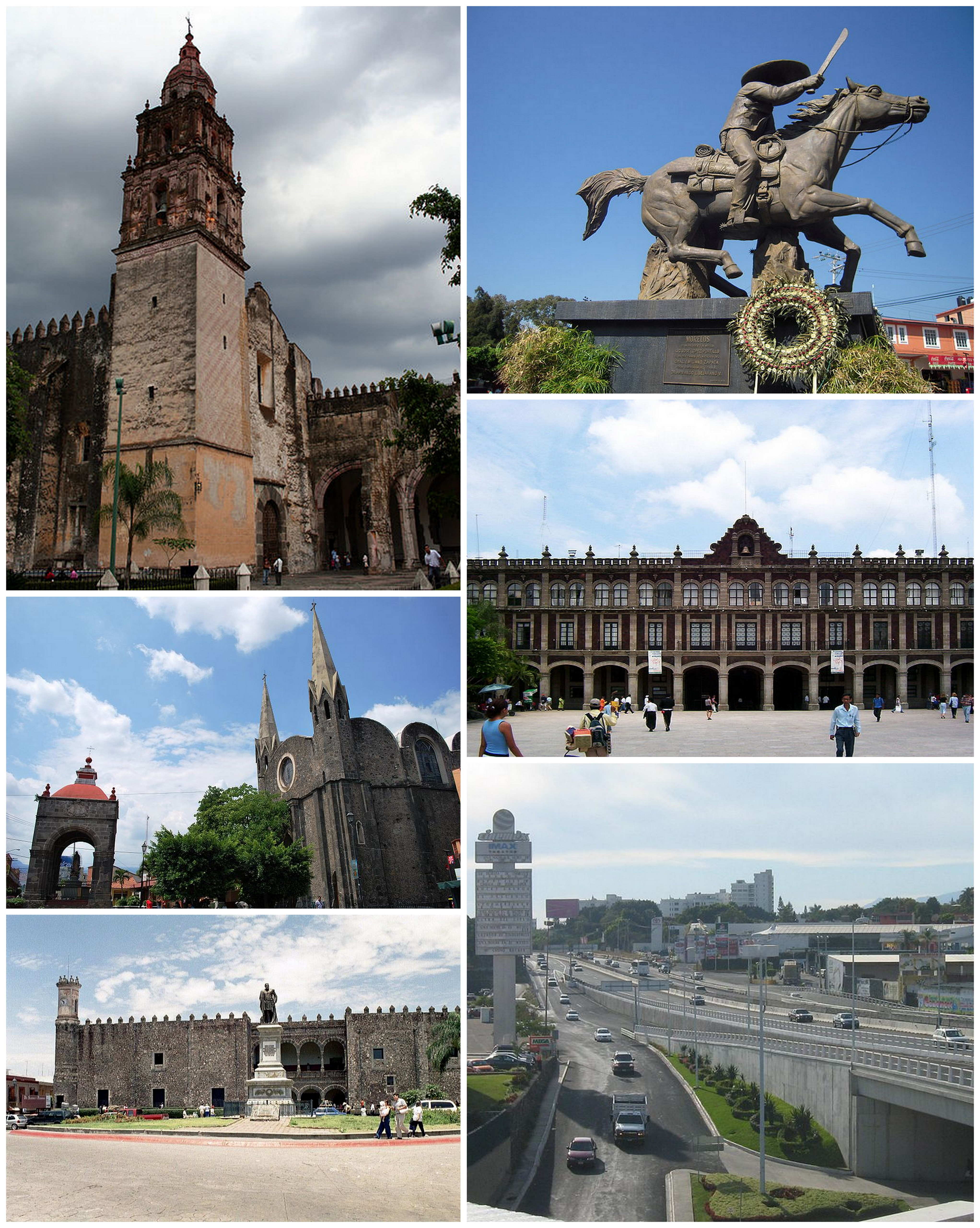 Collage de imágenes de Cuernavaca